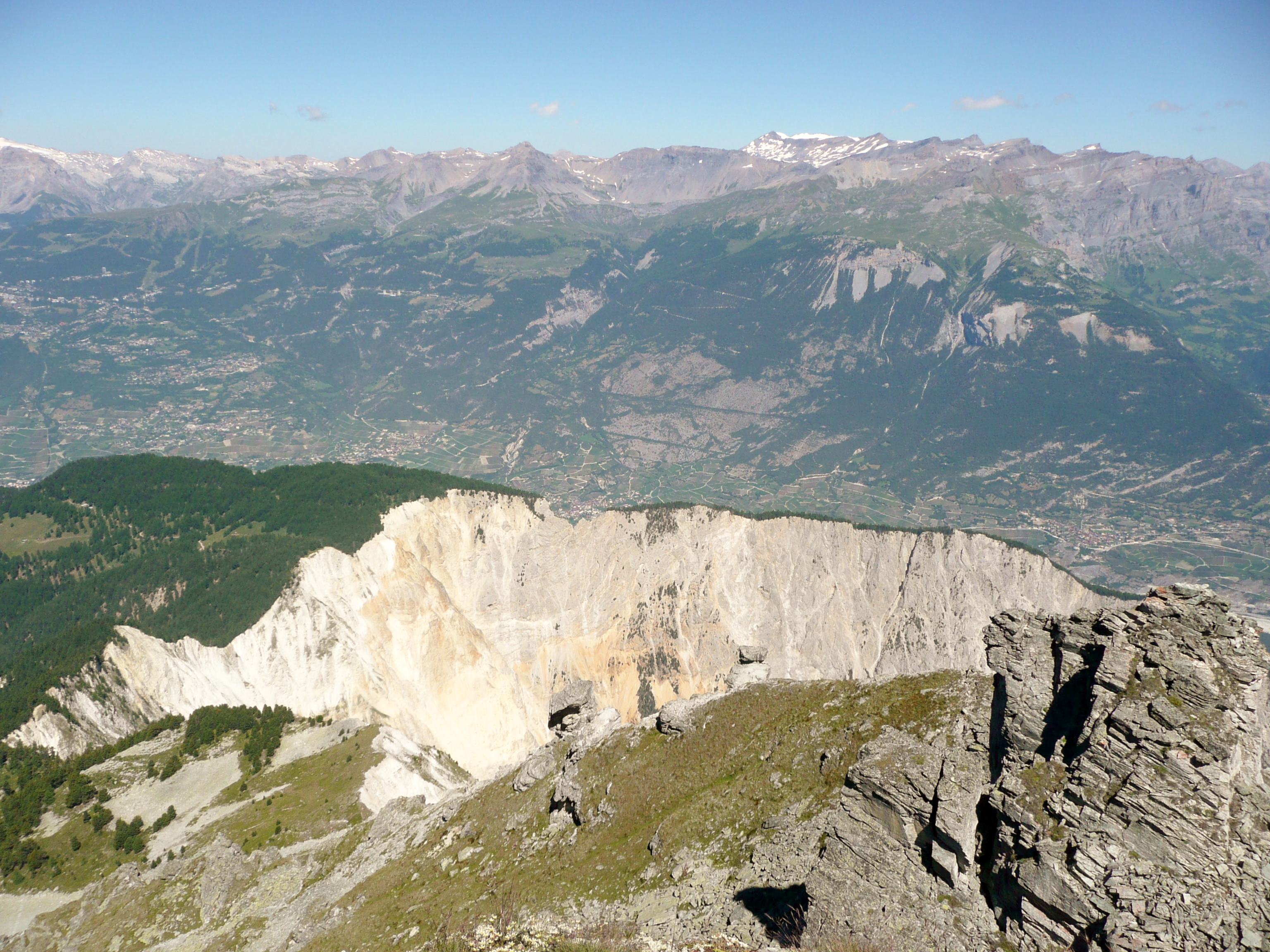 Blick vom Illhorn auf den Illgraben im Schweizer Kanton Wallis.